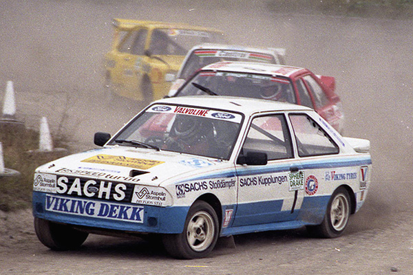 Martin Schanche (N) und sein Ford Escort XR3 T16 4x4 beim Rallycross (Lydden Circuit, 1984)